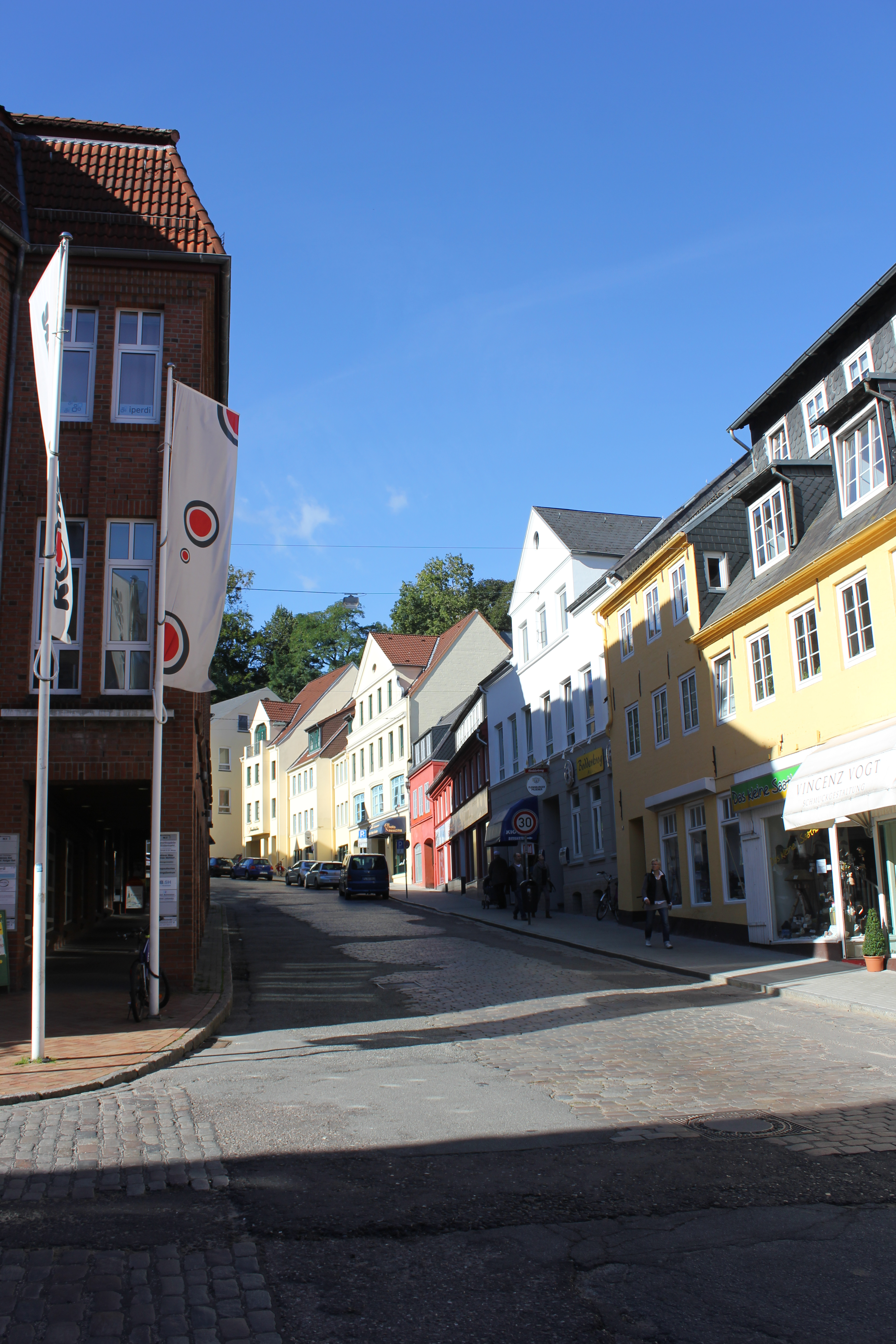 Der Ungefähre Standort des Friesischen Tores nahe dem Anfang der Roten Straße